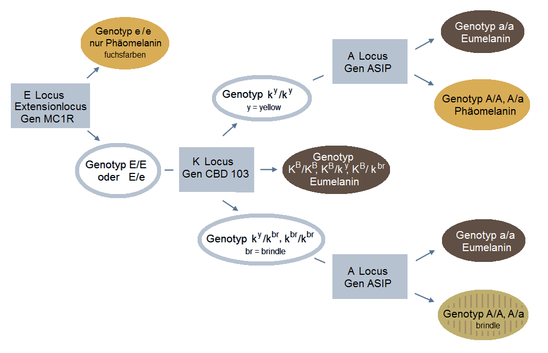 Epistase der Fellfarben-Gene ohne Berücksichtigung des B-Lokus